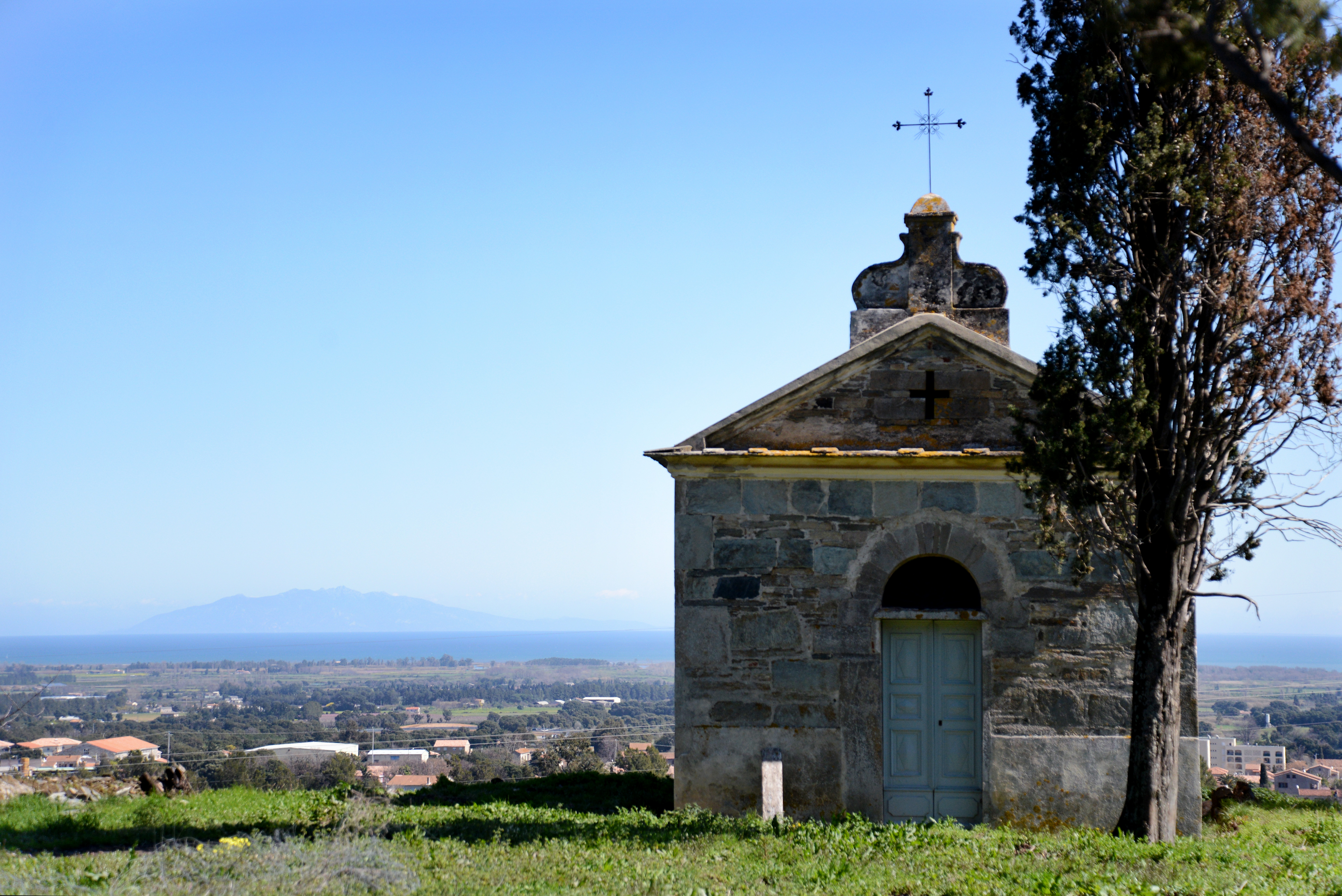 Vescovato, Casinca (Corse) - Chapelle San Mighele (Saint-Michel), édifice roman pouvant dater du XIe siècle, devenu tombeau familial. Sur l'horizon, l'Île d'Elbe